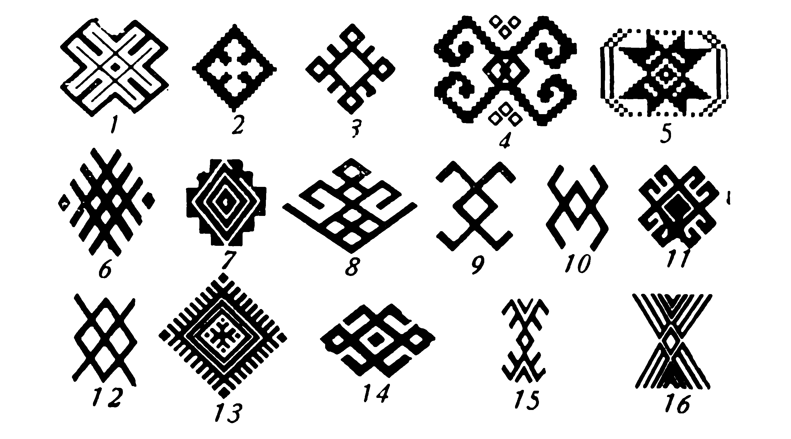 Шестой орнаментальный комплекс включает геометрические фигуры бранного ткачества, счётной и строчевой вышивки.